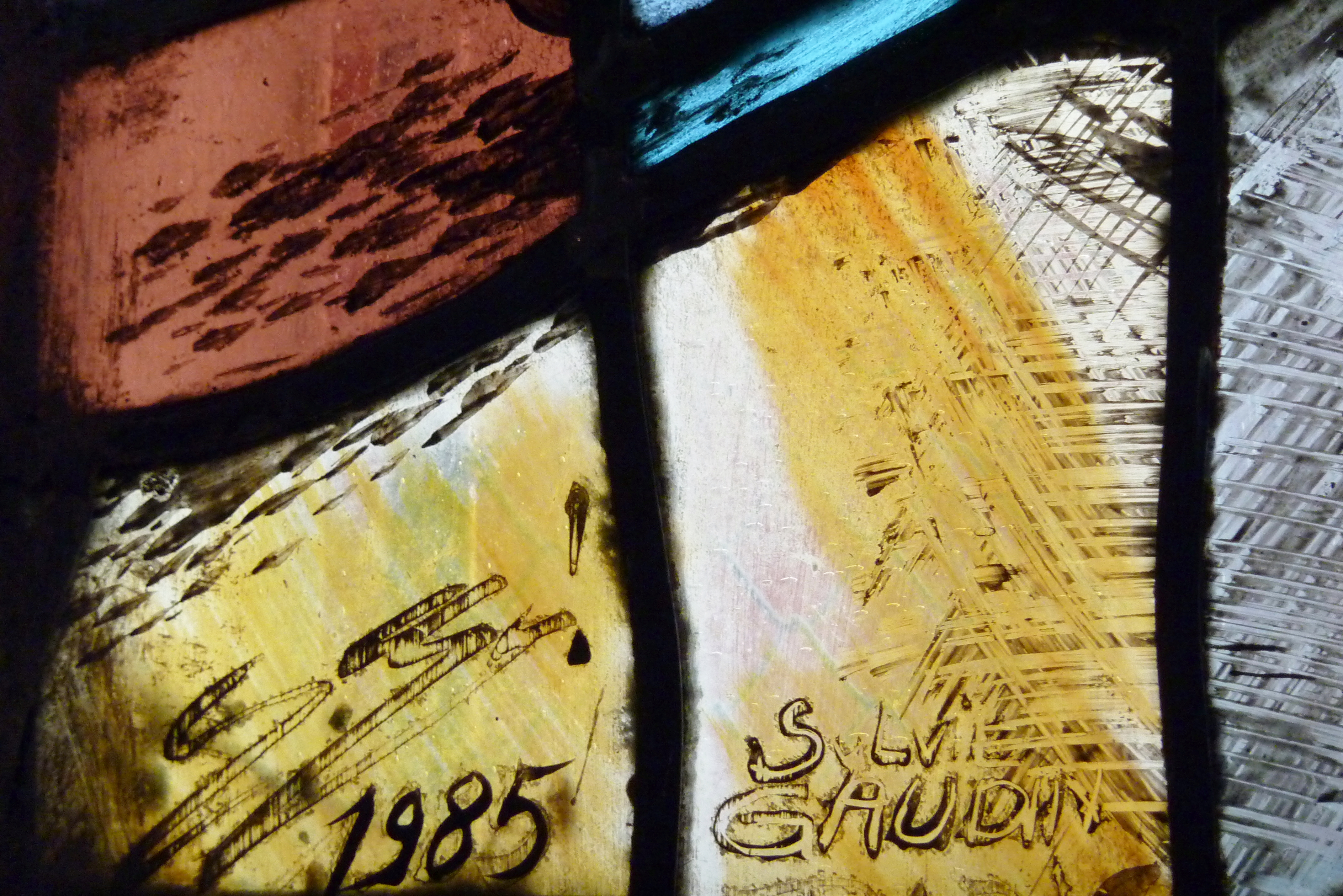 Bleiglasfenster in der Kathedrale Saint-Spire in Corbeil-Essonnes im Département Essonne (Île-de-France), Signatur: Sylvie Gaudin